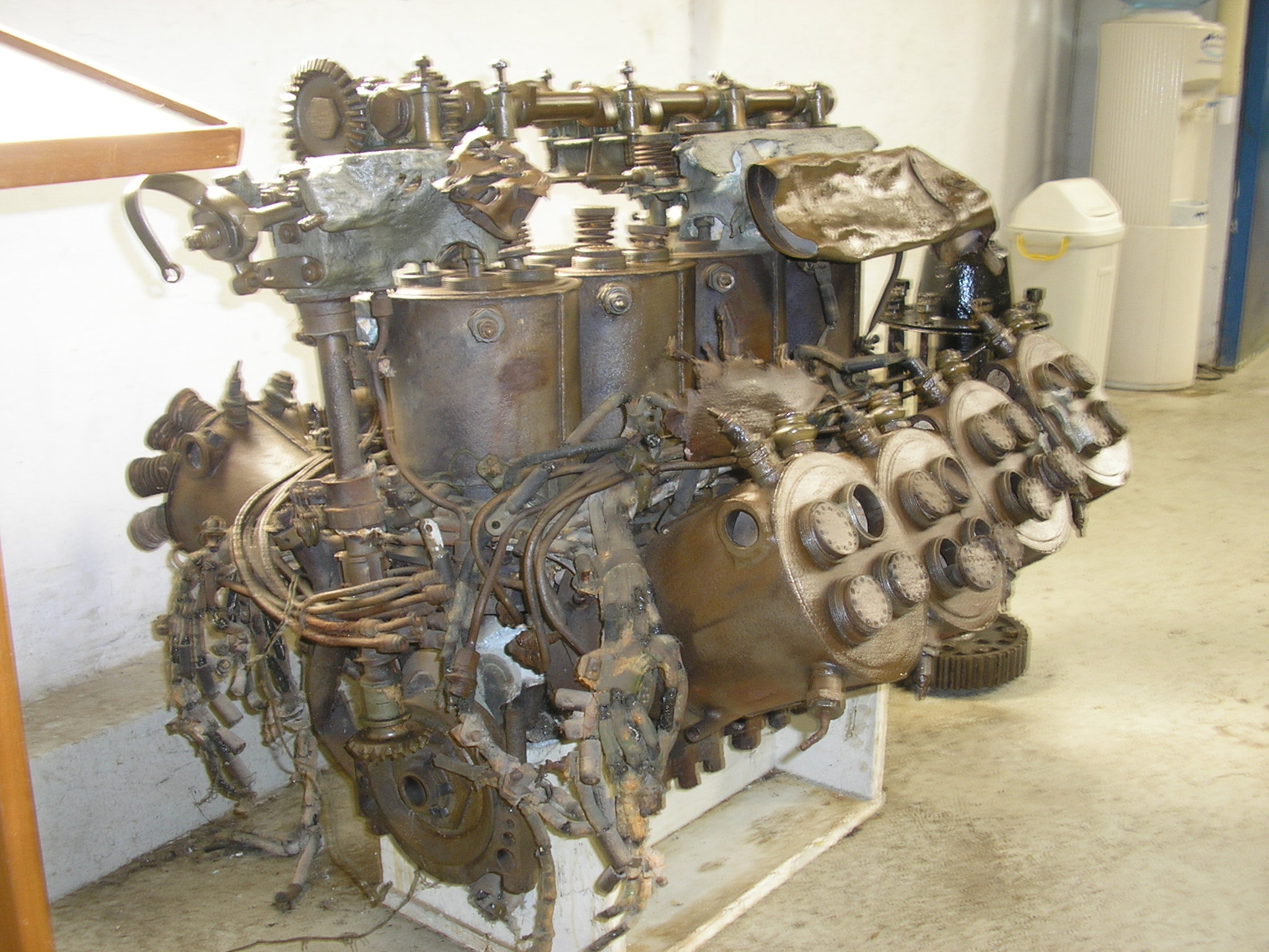 Flugmotor Napier Lion, 12-Zylinder-Y-Motor mit 500 PS, westlich von Malta aus dem Mittelmeer geborgen, ausgestellt im Malta Aviation Museum